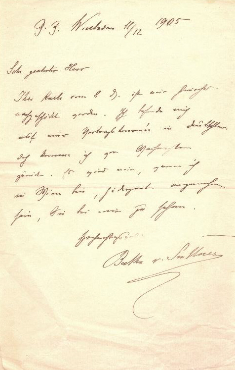 Brief von Bertha von Suttner an einen Herrn; Wiesbaden, 11. 12. 1905 "... Ihre Karte vom 8. d. M. ist mir hierher nachgeschickt worden. Ich befinde mich auf einer Vortragstournee in Deutschland, doch komme ich vor Weihnachten zurück. Es wird mir wenn ich in Wien bin, jederzeit angenehm sein, Sie bei mir zu sehen ...".